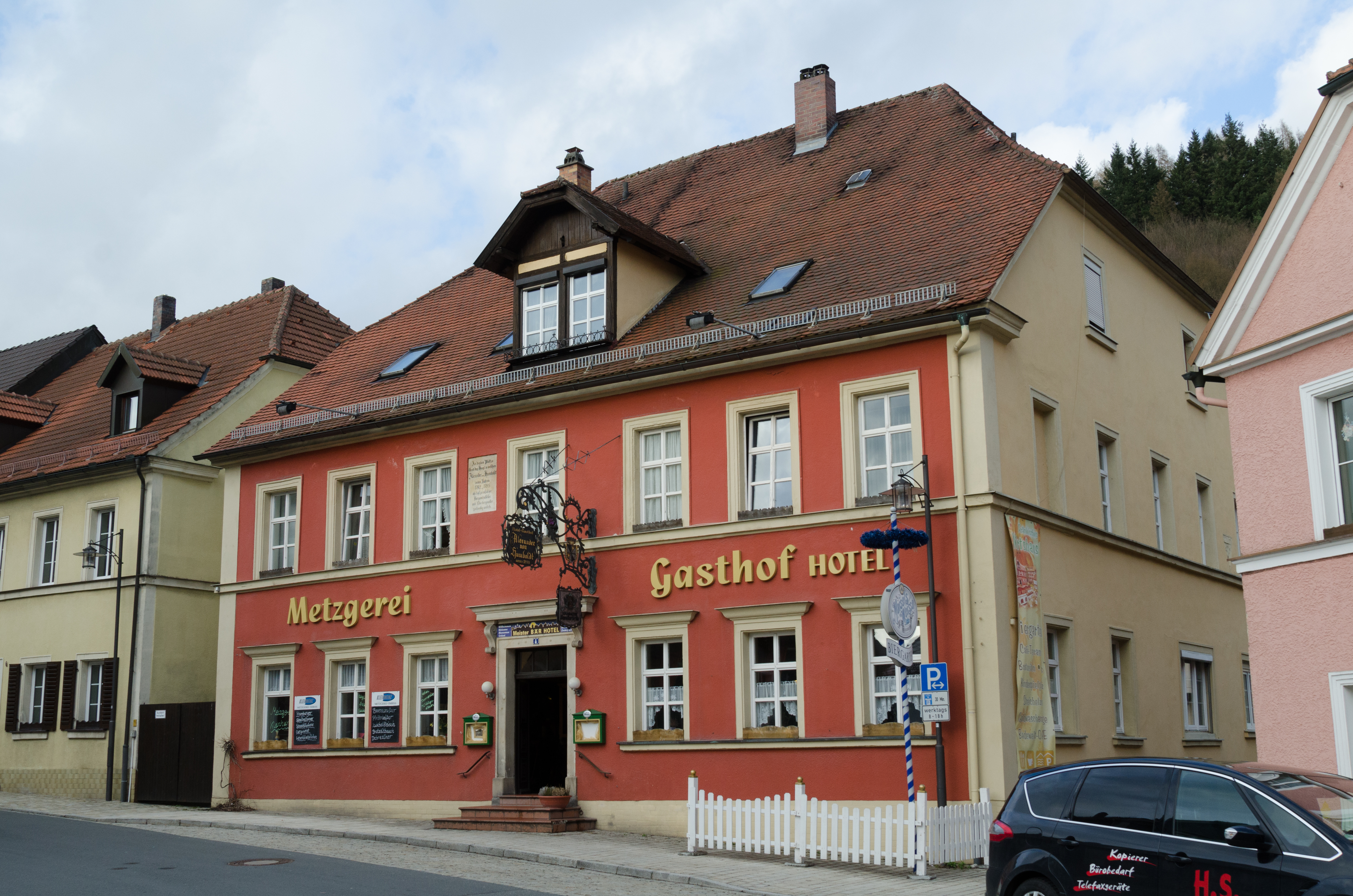 Goldkronach, Bernecker Straße 4